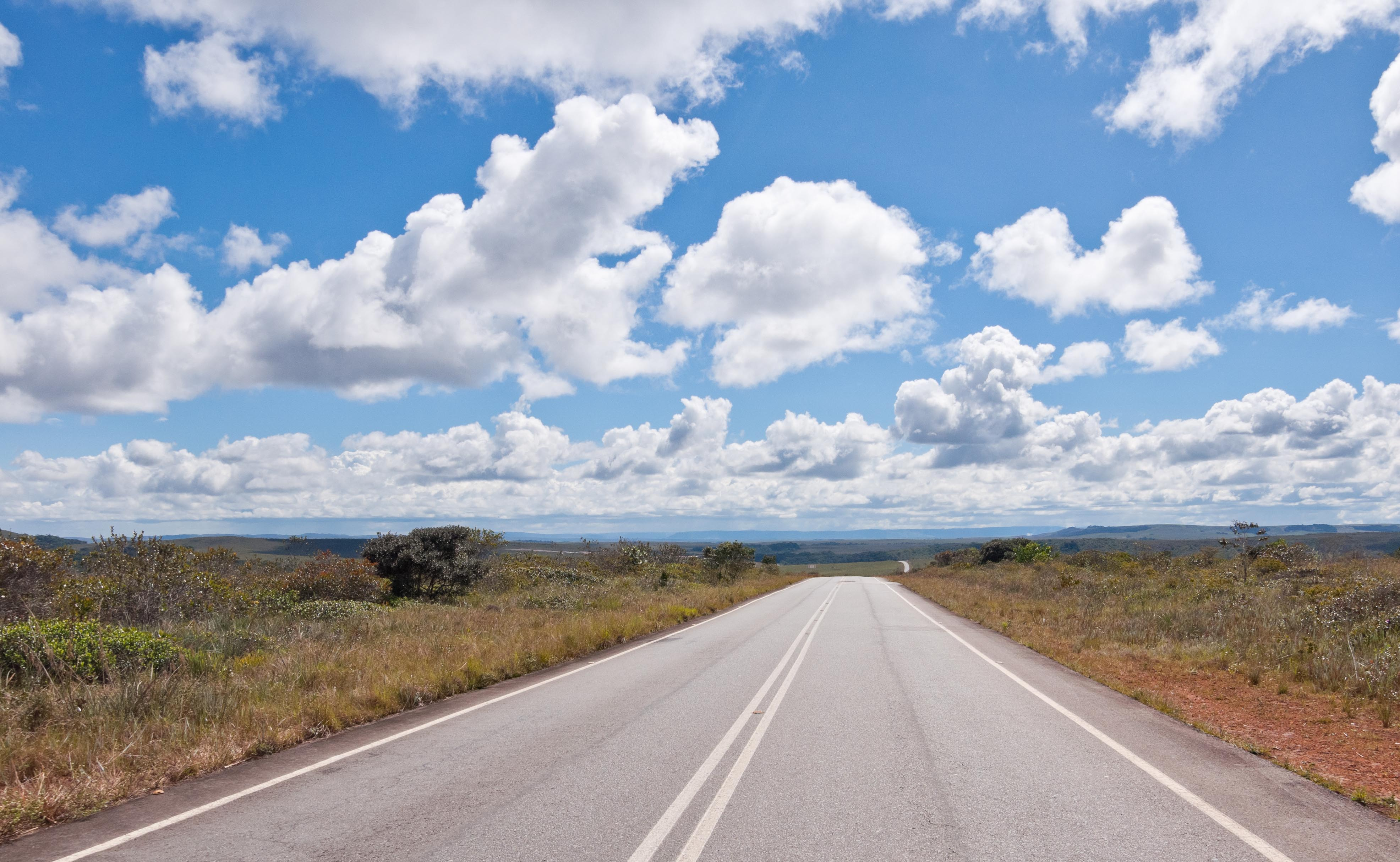 Via Troncal 10 de Venezuela, que atraviesa La Gran Sabana de norte a sur